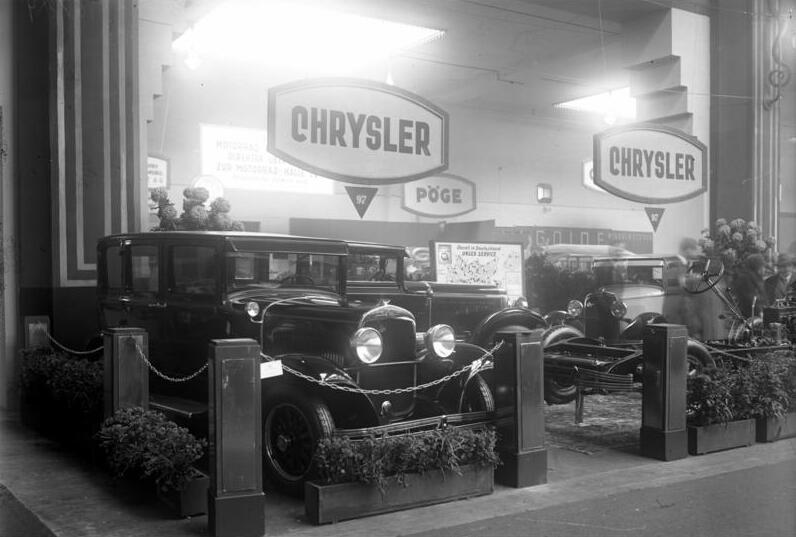 Die Eröffnung der Internationalen Automobilausstellung in den Ausstellungshallen am Kaiserdamm in Berlin! Der Stand der Chrysler-Automobile auf der Ausstellung.